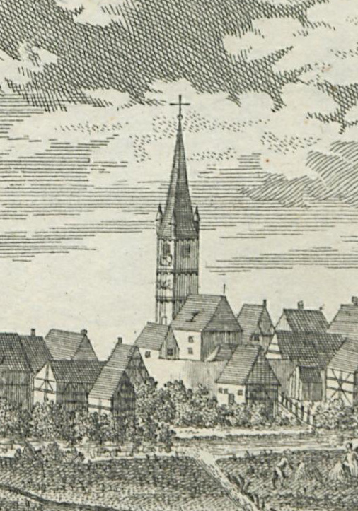 Detailansicht aus: Christoph Melchior und Matthäus Roth: Prospecte aller Nürnbergischen Stædtlein, Markt-Flecken, und Pfarr-Dörffern, accurat abgezeichnet von M. G. Lampferdtinger. Christoph Melchior Roth, iny. del et sculps. Nürnberg, 1760